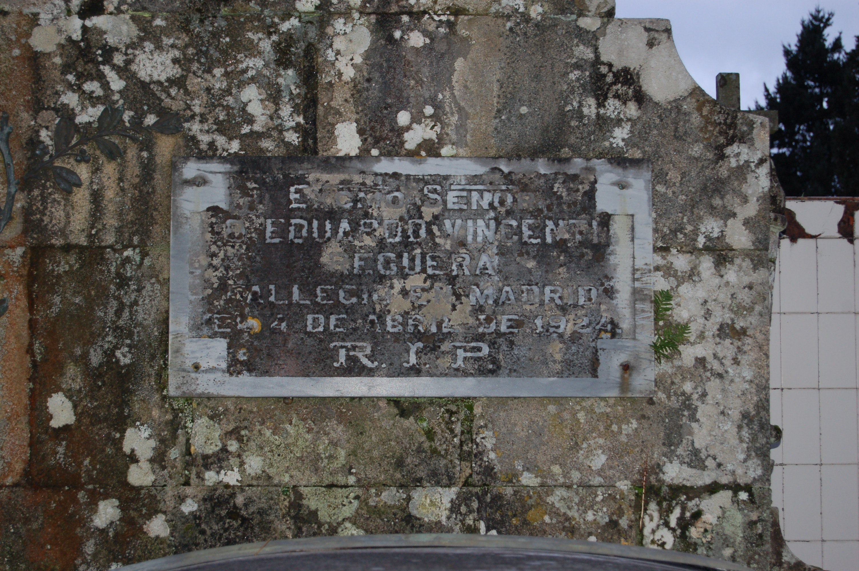 Sepulcro de Eduardo Vincenti Reguera no Cemiterio de San Amaro de Pontevedra